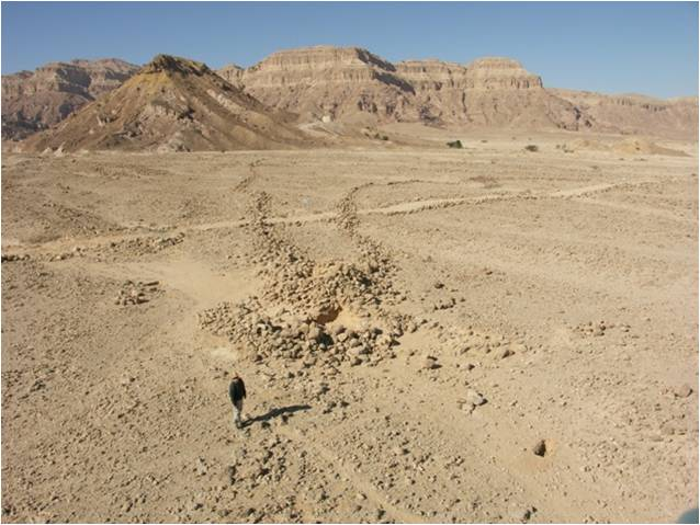 Desert Kite Archaeology Sites in the Negev South of Israel Dated8,300-4,500BC עפיפוני המדבר הינם מתקנים ששימשו לצייד המוני של עדרי חיות בר. עפיפוני המדבר ידועים היום בארבע מוקדים מרכזיים במזרח התיכון: עפיפוני הנגב, הערבה וסיני, עפיפוני מזרח ירדן, עפיפוני ערב הסעודית ועפיפוני המדבר הסוריה. ניתן לראות כי עפיפוני הנגב, הערבה וסיני הם קטנים יחסית בממדיהם, בעוד שעפיפוני ירדן וסוריה הם גדולים מאוד ונבנו לרוב בשרשראות. בעפיפוני סוריה ערב הסעודית ניתן לראות דבר שונה מעט, כאשר לעיתים ניתן לראות עפיפון אחד עם מספר בורות הריגה. האתרים מתוארכים לשנים 8,300-4,500 לנני הספירה ראש עפיפון המדבר ממערב לקיבוץ סמר מצפון לאילת